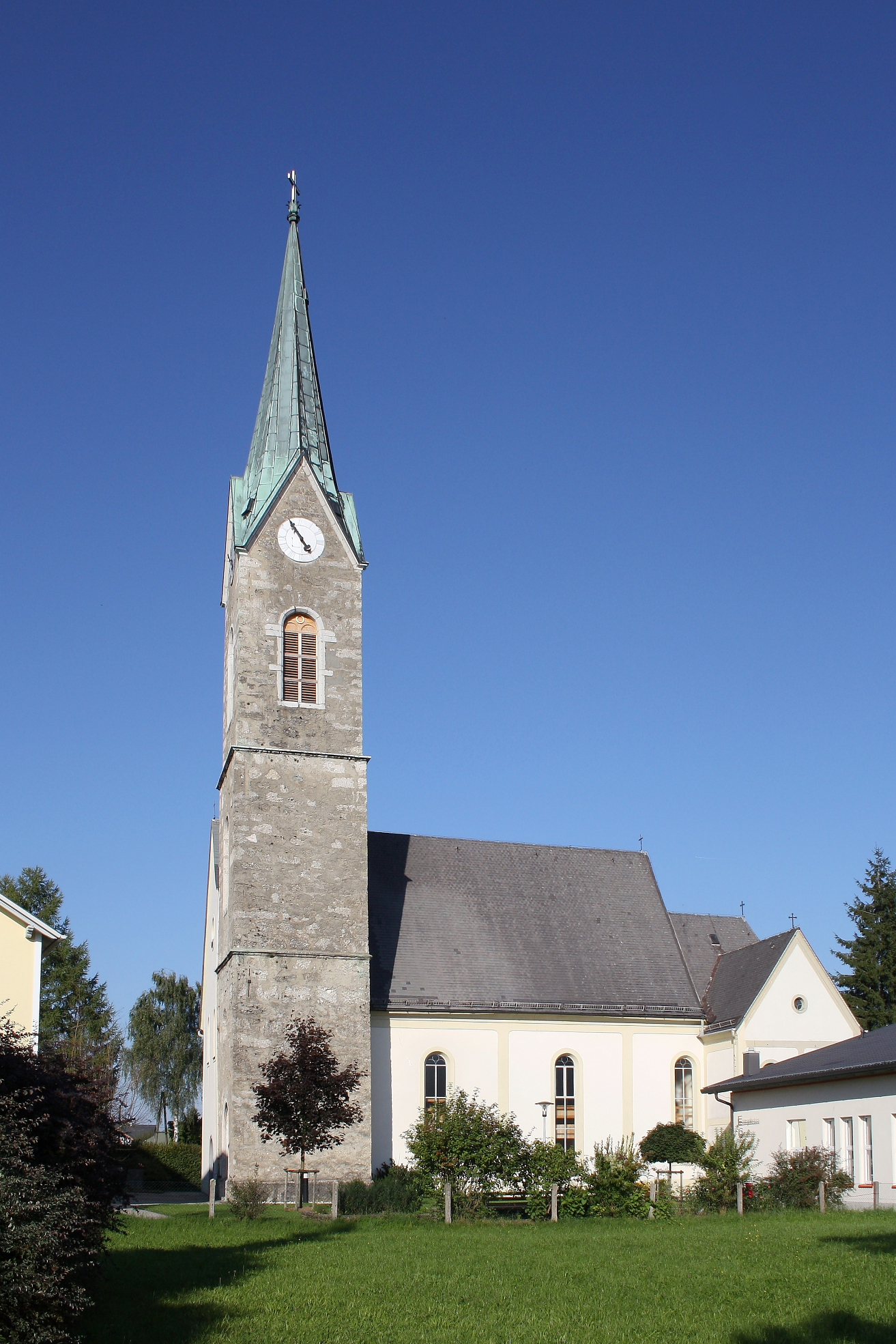 Die als Toleranzbethaus im Jahr 1783 erbaute evangelische Pfarrkirche in Rutzenmoos, Gemeinde Regau. Turm und Apsis wurden in der zweiten Hälfte des 19. Jahrhunderts angebaut.